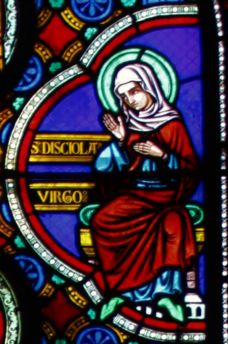 Détail d'un vitrail du chœur représentant Sainte Disciole, dont le tombeau se trouve dans la crypte de l'église Sainte Radegonde de Poitiers.